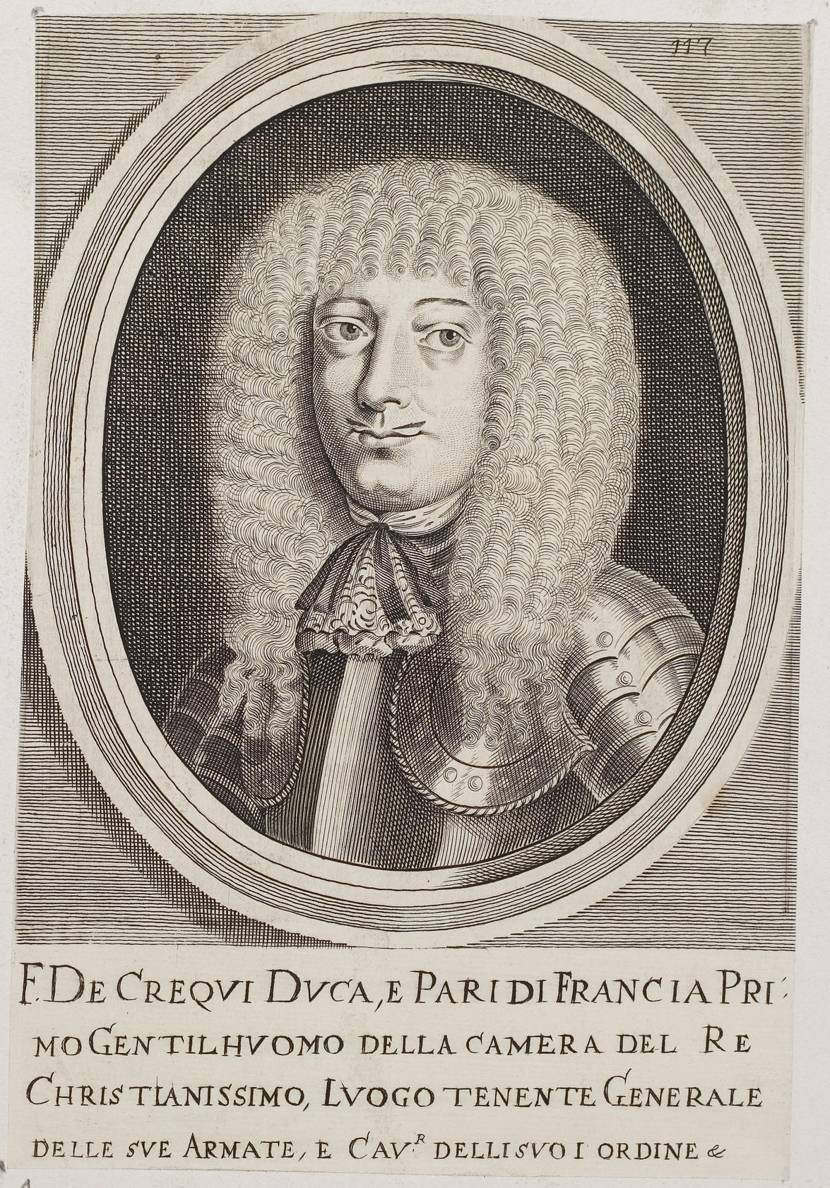 Grafik aus dem Klebeband Nr. 2 der Fürstlich Waldeckschen Hofbibliothek Arolsen Motiv: François de Créquy, marquis de Marines, Marschall von Frankreich